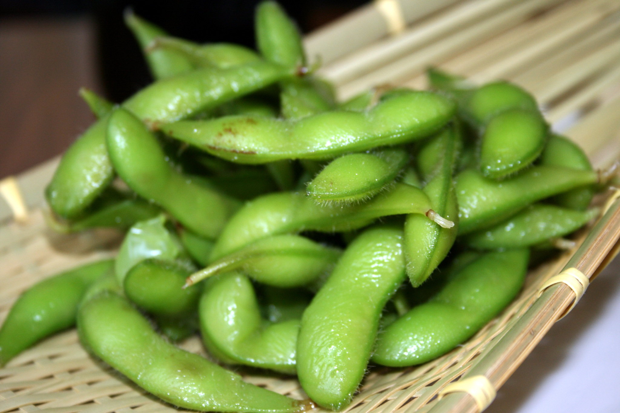 枝豆(米国イリノイ州シカゴのレストラン「Republic Pan-Asian Restaurant リパブリック・パン-アジアン・レストラン」)Edamame